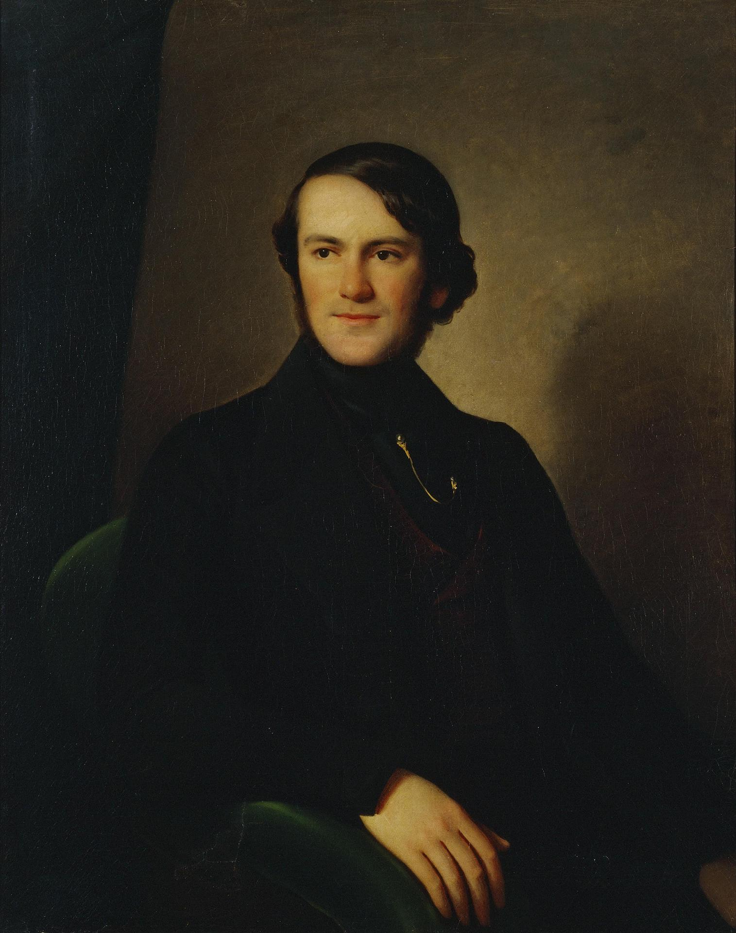 Портрет барона Александра Людвиговича Штиглица